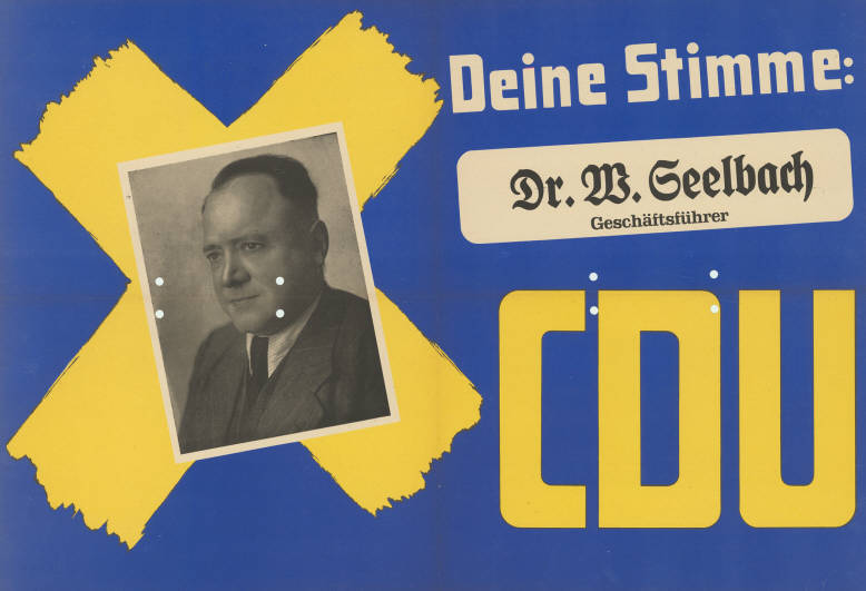 Deine Stimme: Dr. W. Seelbach Geschäftsführer CDU Abbildung: Porträtfoto - Stimmkreuz Plakatart: Kandidaten-/Personenplakat mit Porträt Objekt-Signatur: 10-009 : 185 Bestand: Landtagswahlplakate Nordrhein-Westfalen (10-009) GliederungBestand10-18: Landtagswahlplakate Nordrhein-Westfalen (10-009) » Landtagswahl am 18.6.1950 » CDU » mit Porträtfoto Lizenz: KAS/ACDP 10-009 : 185 CC-BY-SA 3.0 DE